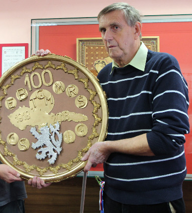 Karel Huněk v Muzeum rekordů a kuriozit v Pelhřimově se svojí největší medaili ke 100. výročí vzniku samostatného Československa